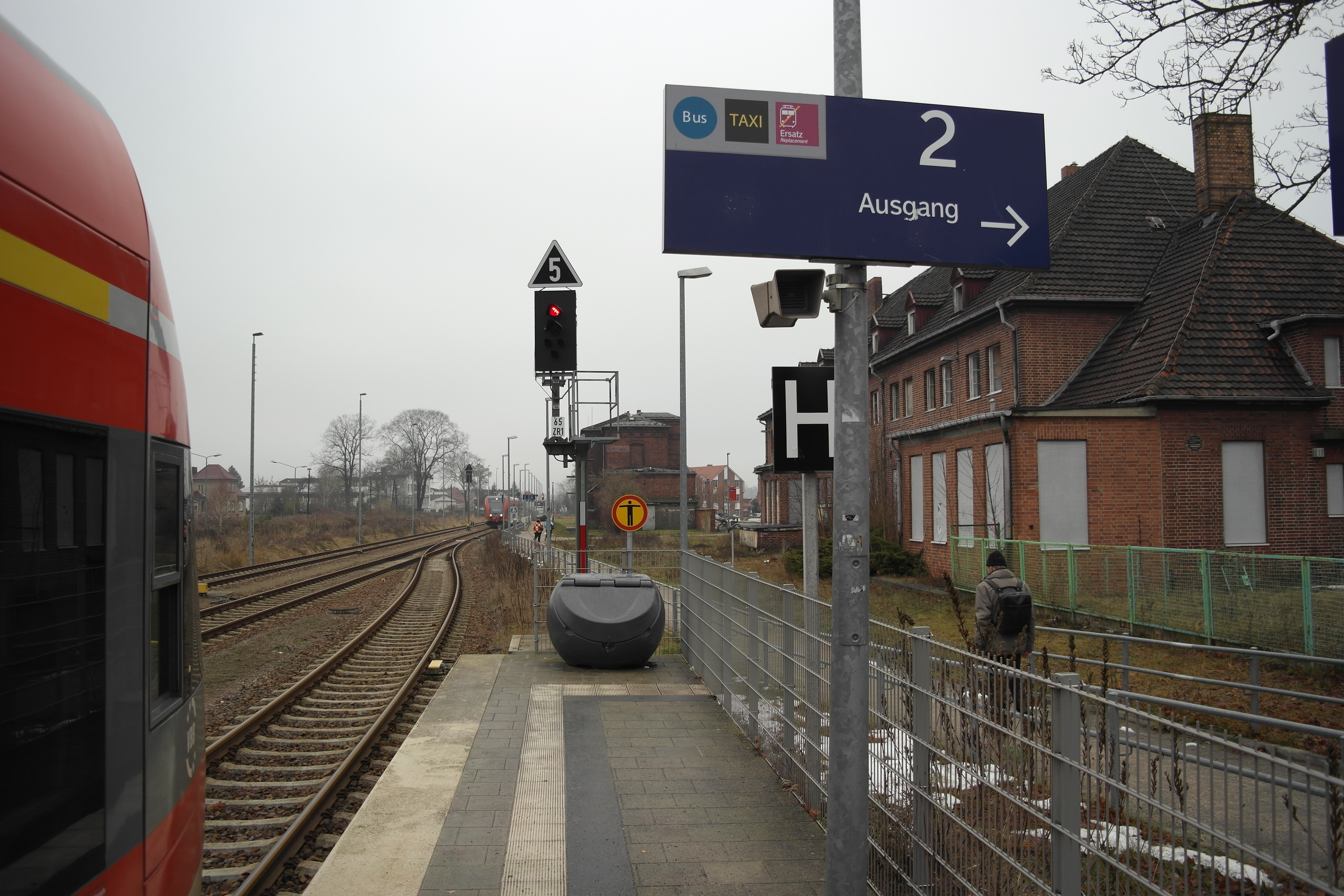 Bahnhof Wittstock, Bahnsteig, im Vordergrund in Richtung Wittenberge, im Hintergrund Richtung Neuruppin-Berlin